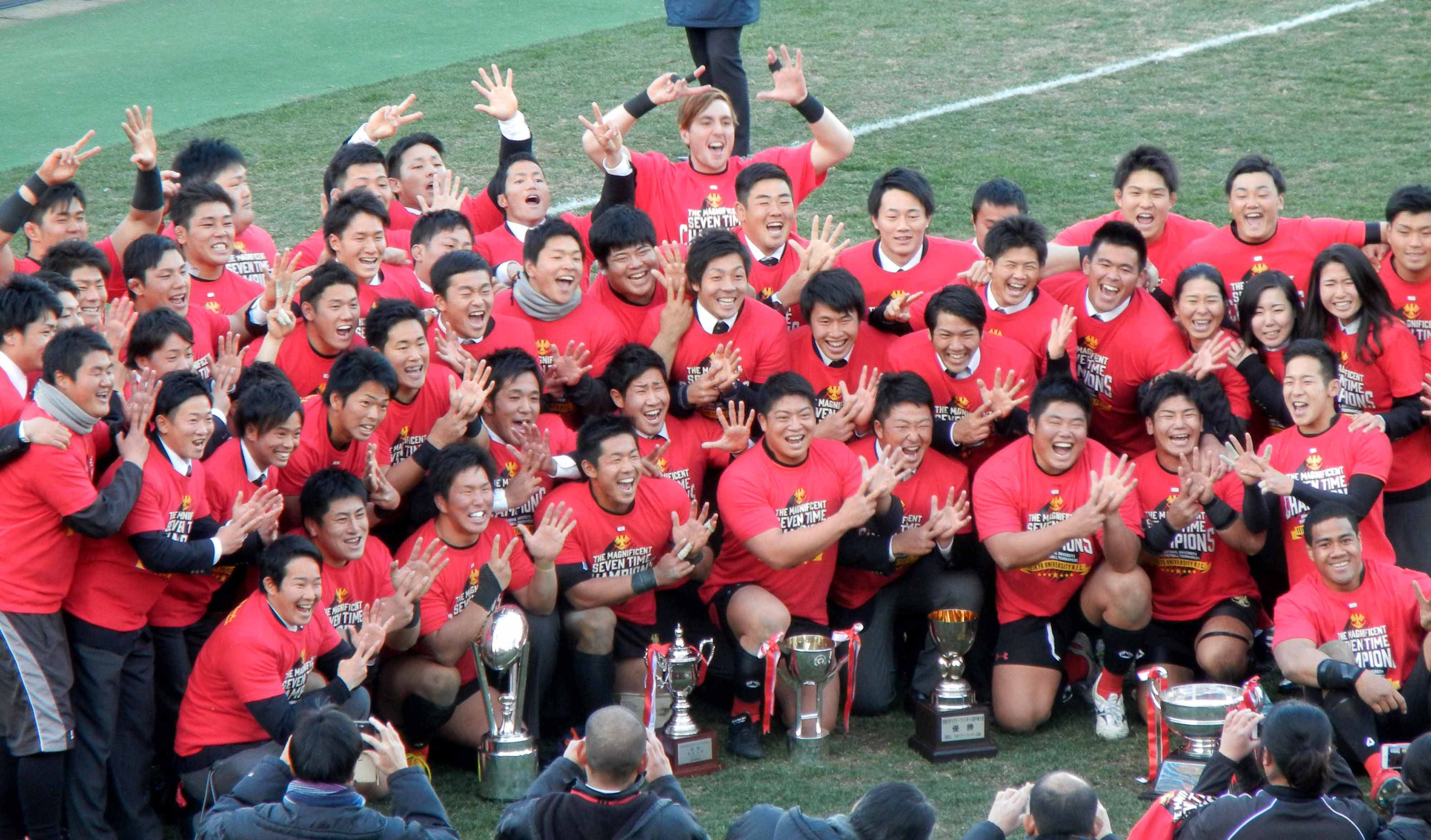 第52回ラグビー大学選手権優勝 帝京大学ラグビー部